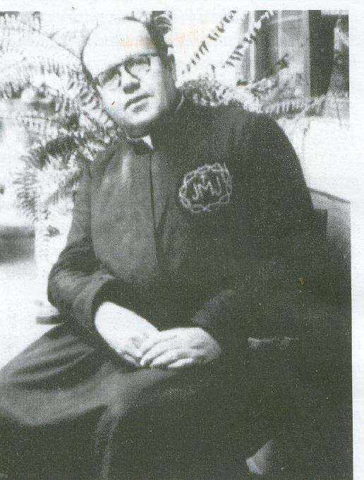 FUNDADOR DE LOS MISIONEROS DE LA SAGRADA FAMILIA Y LAS OPERARIAS DE LA SAGRADA FAMILIA.